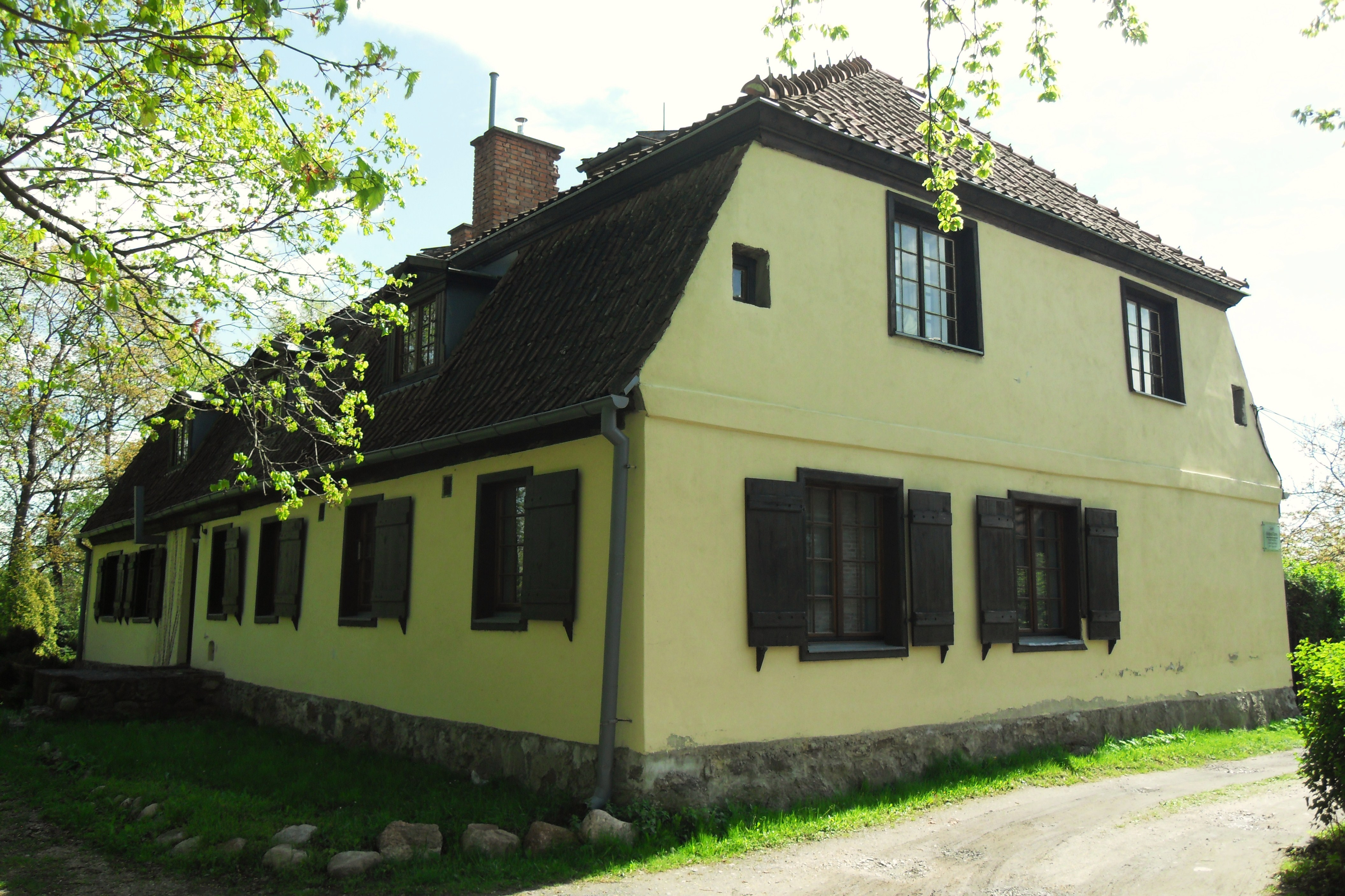 Gdańsk Kiełpino Górne. Dwór z pocz. XIX wieku, ul. Goplańska 34.